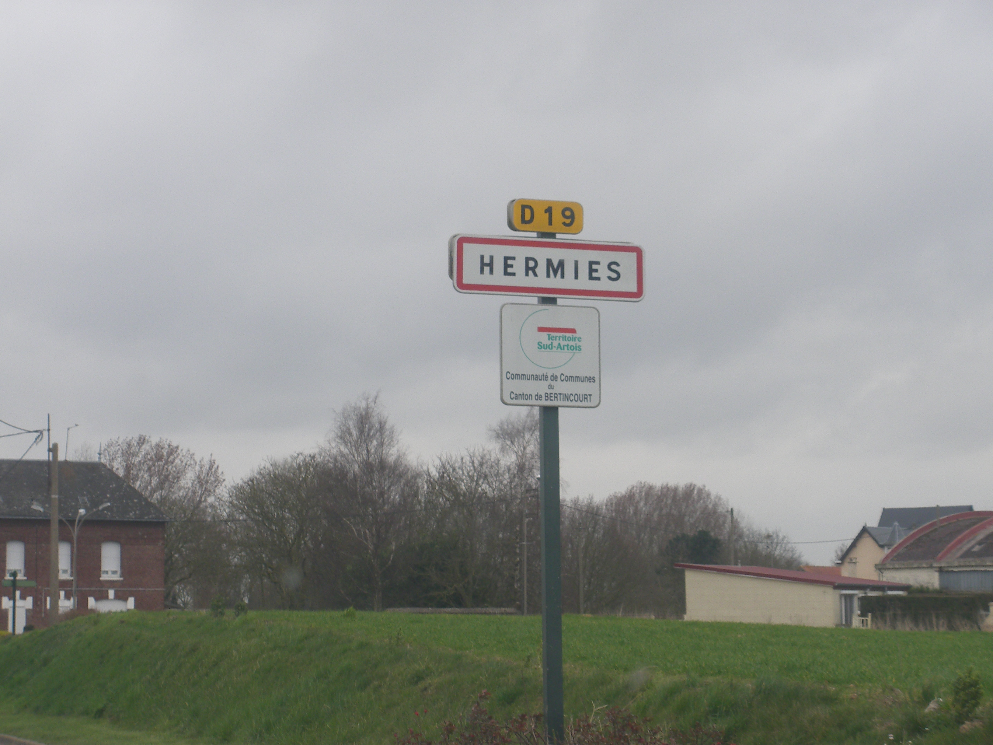 Panneau d'entrée de la commune d'Hermies.